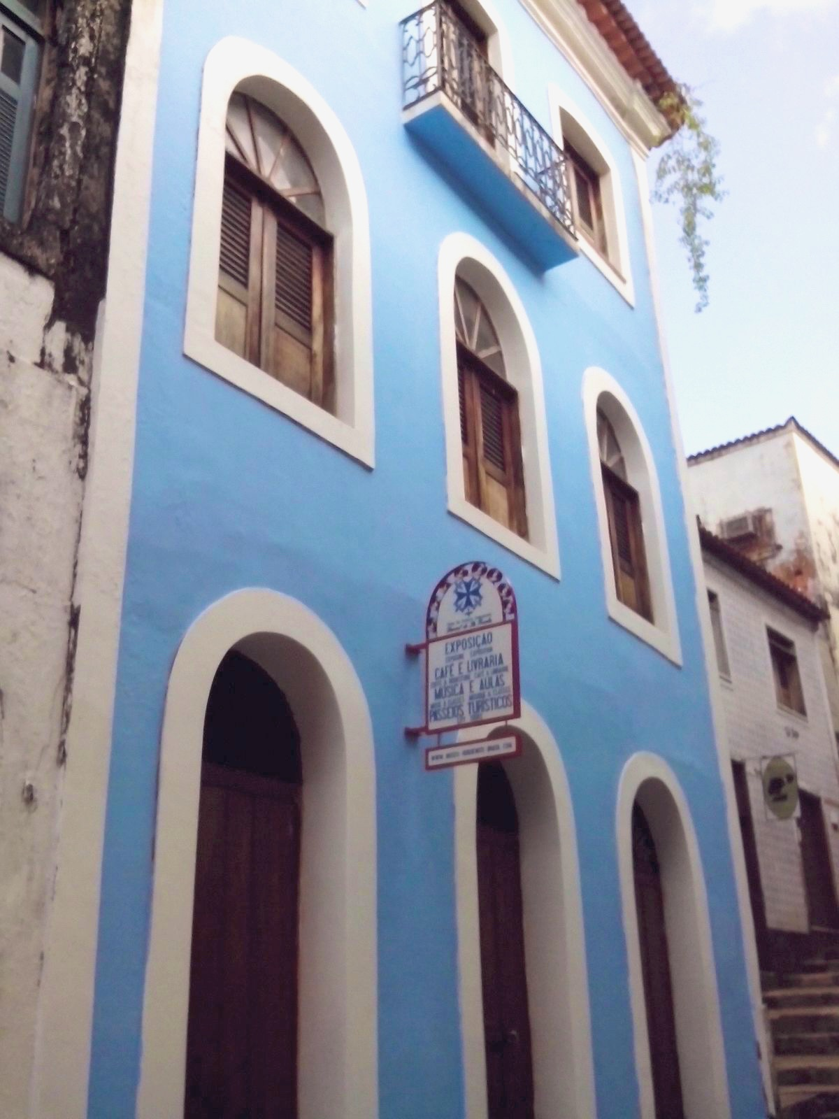 Frente da Casa de Cultura Huguenote Daniel de La Touche, Beco catarina Mina, São Luís.